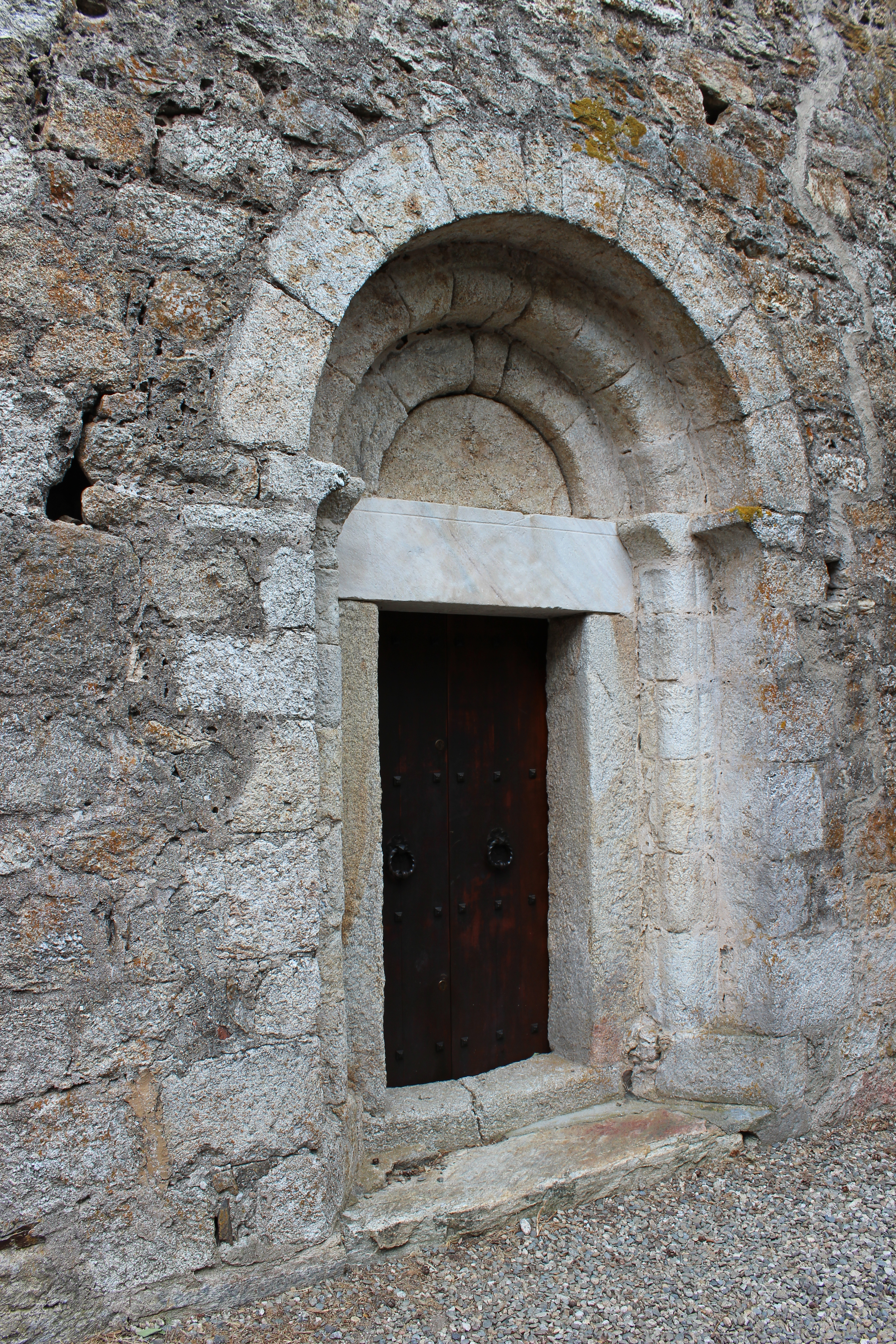 Église Saint-Martin de Lavall, portail